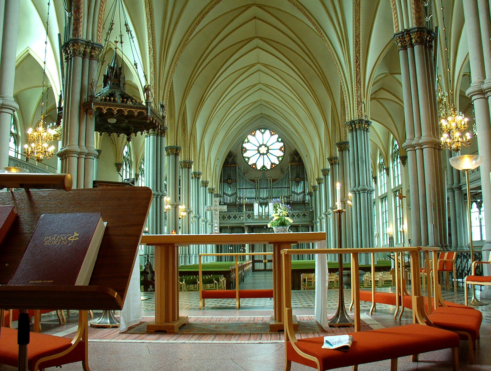 Date August 2005